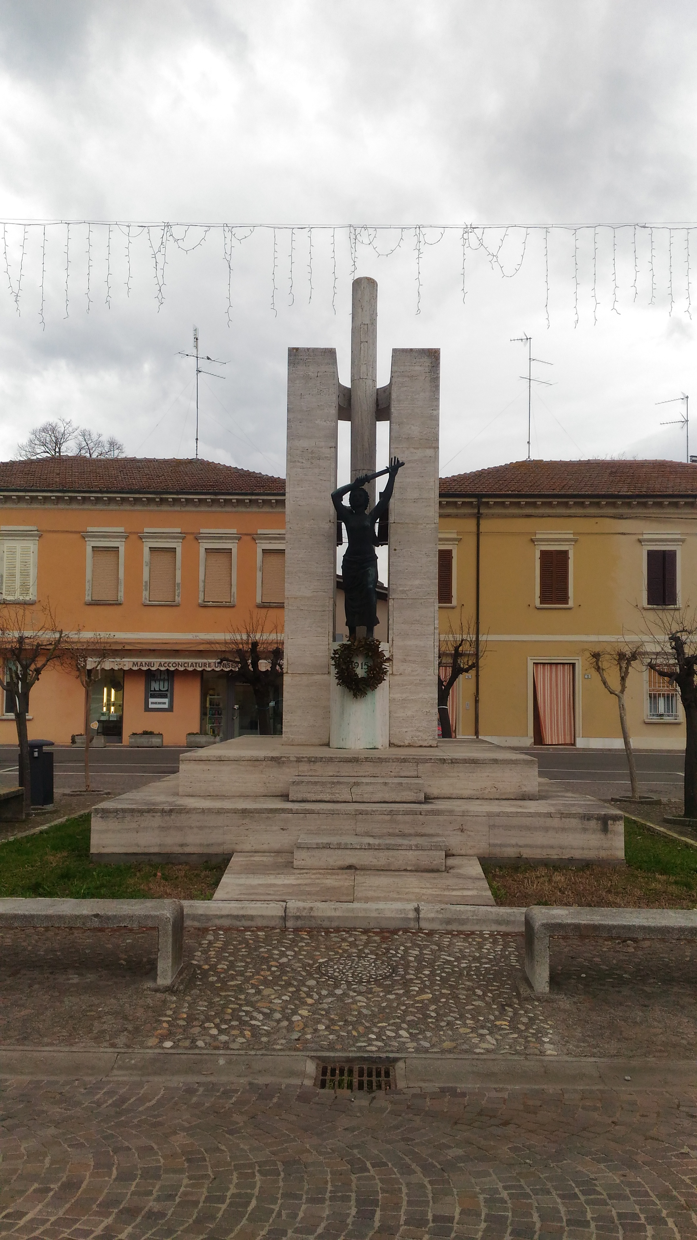 Vittoria alata 1936 di Angelo Biancini